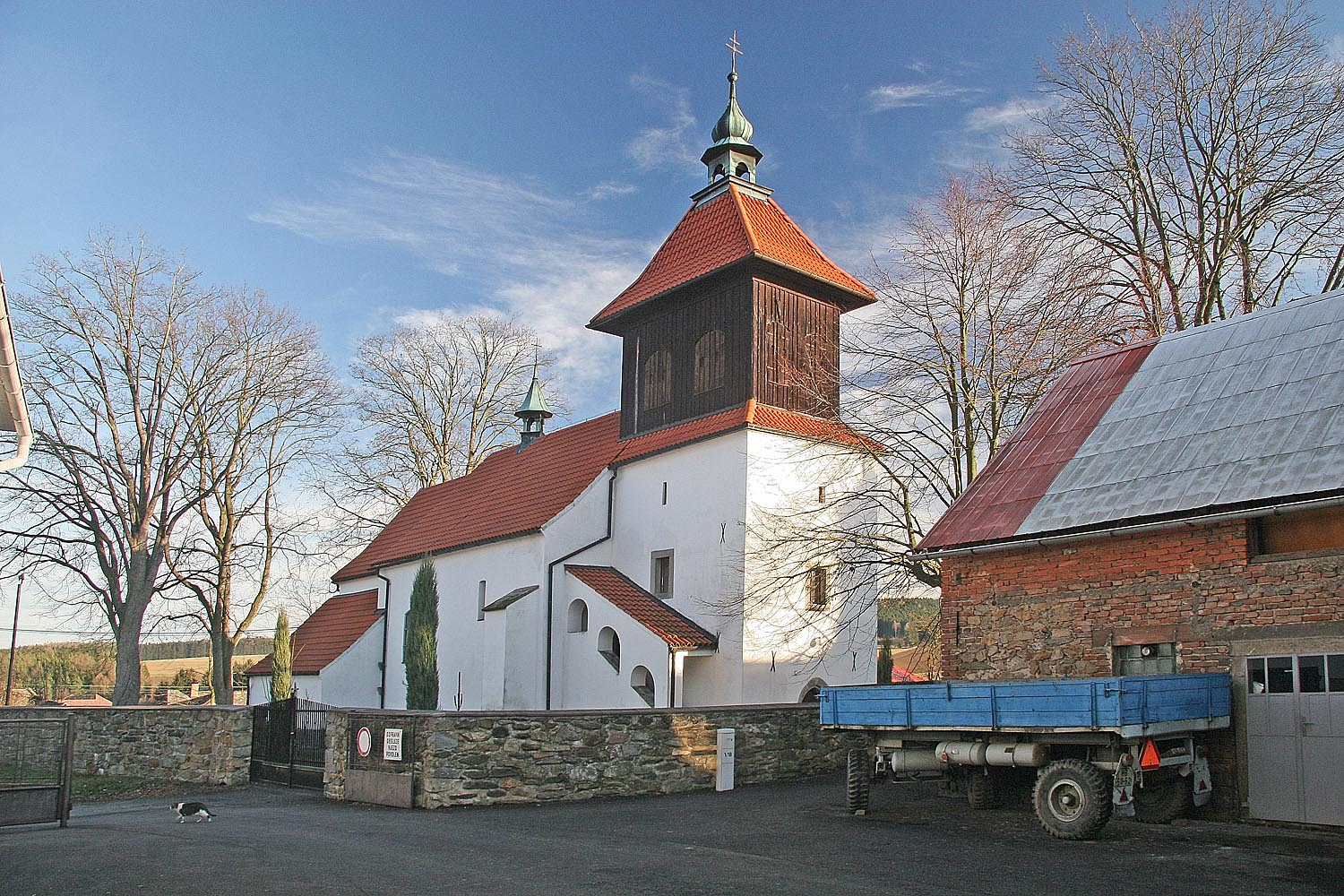 Kostel Svaté Markéty v obci Lučice, okres Havlíčkův Brod autor: Prazak date: 15. 12. 2006